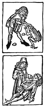 Extraction et usage d'une crapaudine